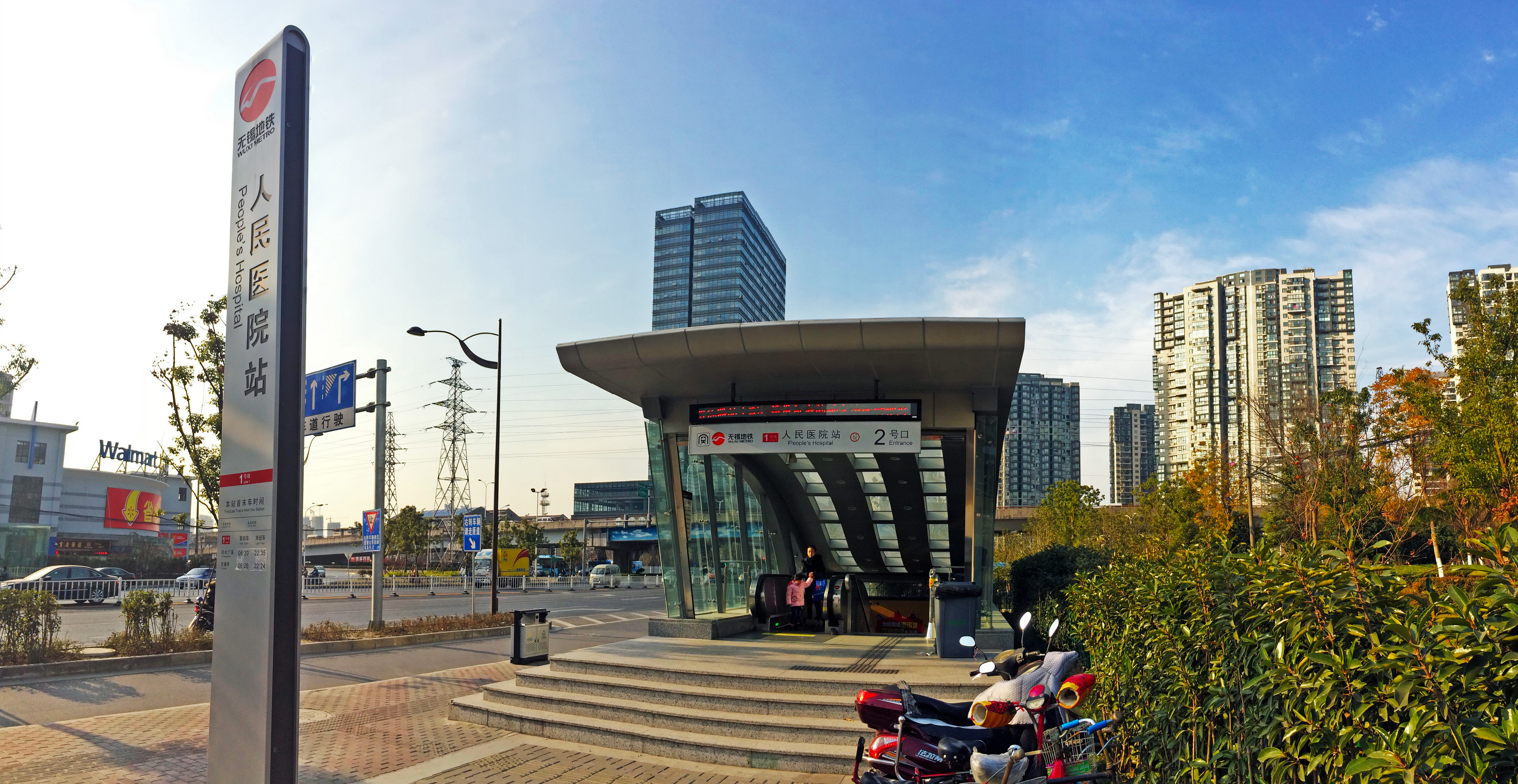 無錫地鐵人民醫院站2號出口